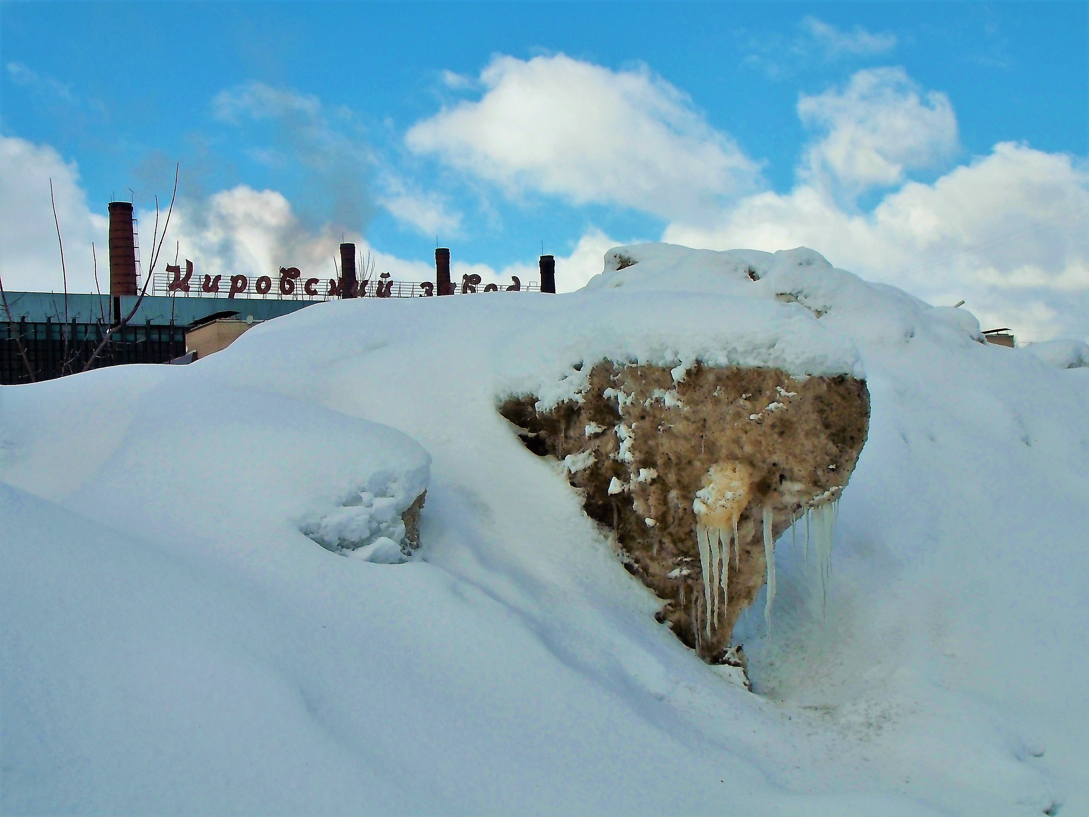 Кировский завод (2011.03.06)